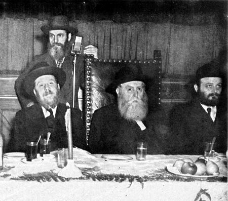 הרב שמריהו גוראריה לצד חותנו וגיסו (מאחור חסקינד), בכינוס בארה"ב